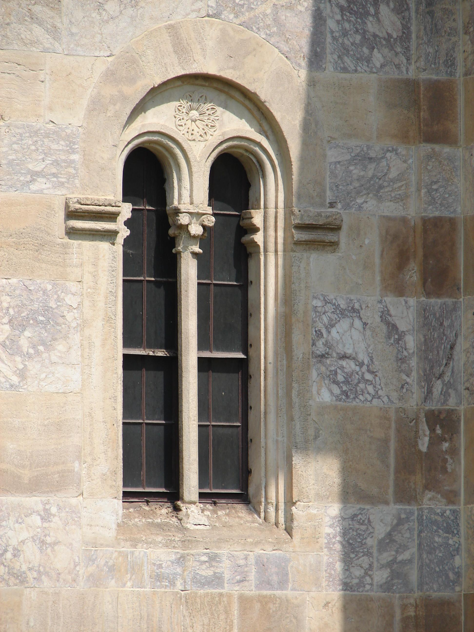 Bifora in Visoki Dečani monastery.